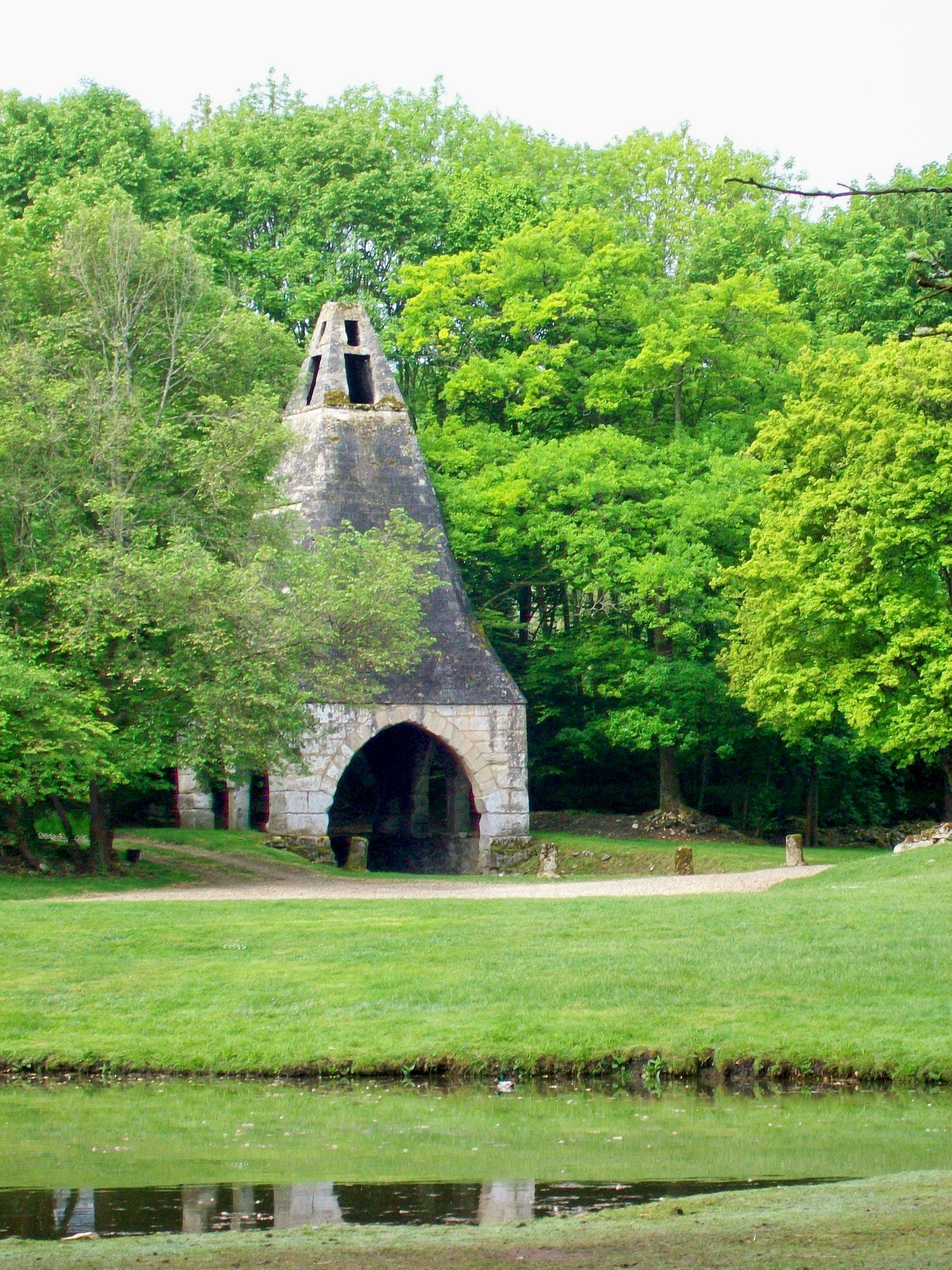 La cheminée gothique du four de la tuilerie de l'abbaye de Chaalis, sur le domaine de l'ancienne grange abbatiale au lieu-dit Com(m)elle(s) à Orry-la-Ville (60) ; connu localement comme la « lanterne des morts ». Classement Monuments historiques au 18 avril 1914.